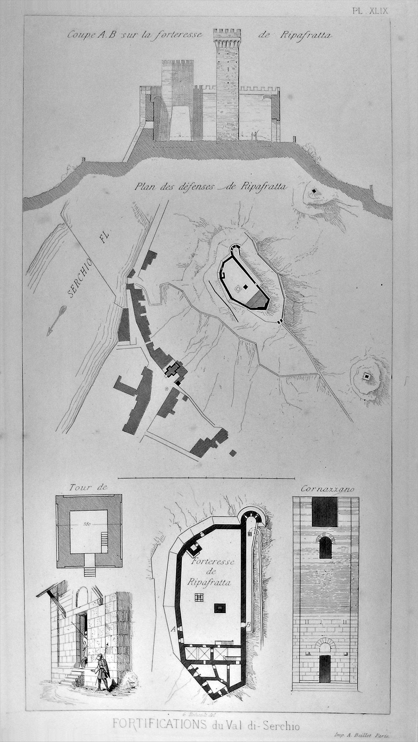 Disegno in pianta e sezione del Castello di Ripafratta